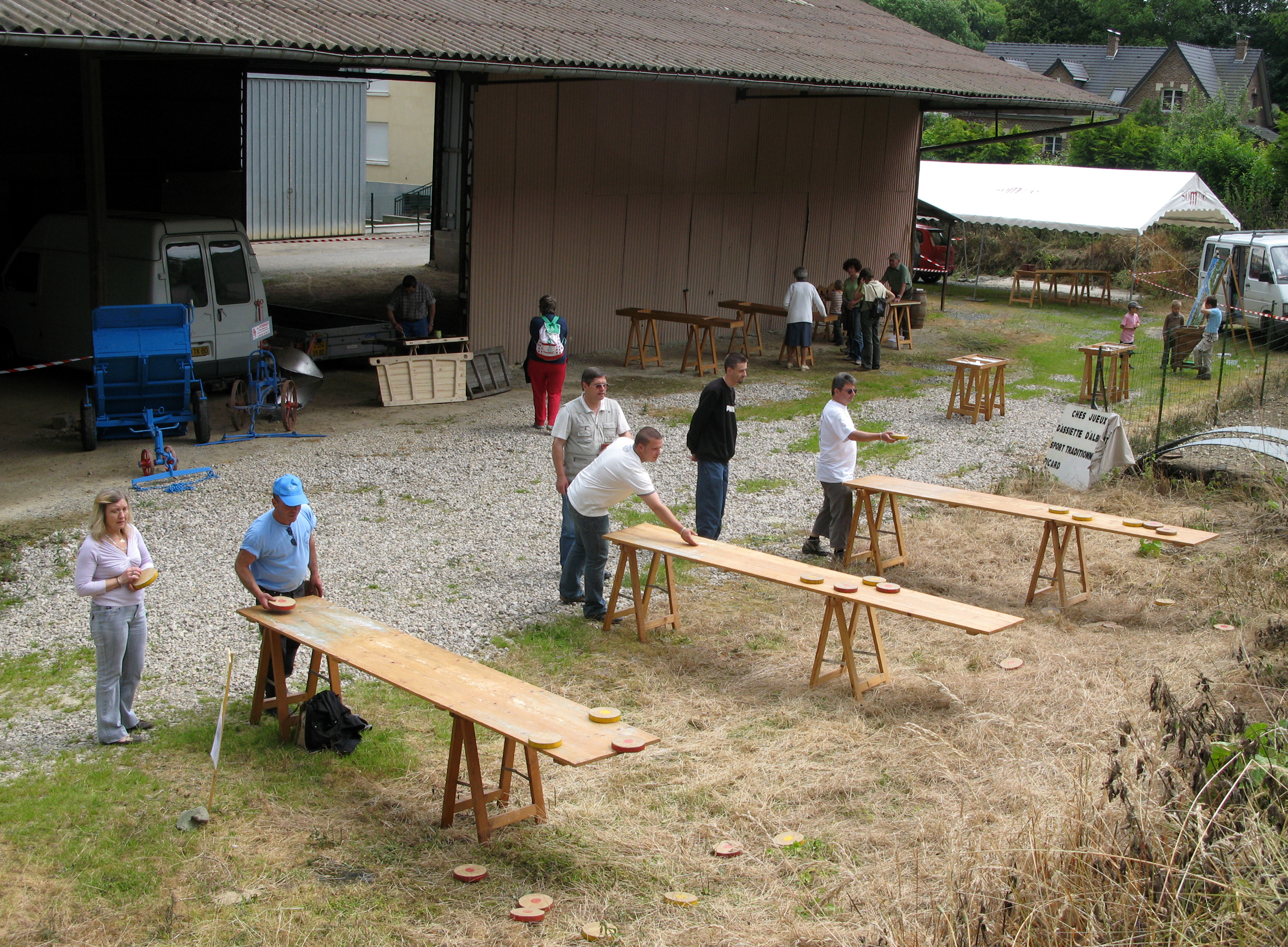 Bresle (Somme, France) - Animation locale autour d'un jeu picard traditionnel, le "jeu de l'assiette". Les animateurs sont membres d'une association d'Albert.